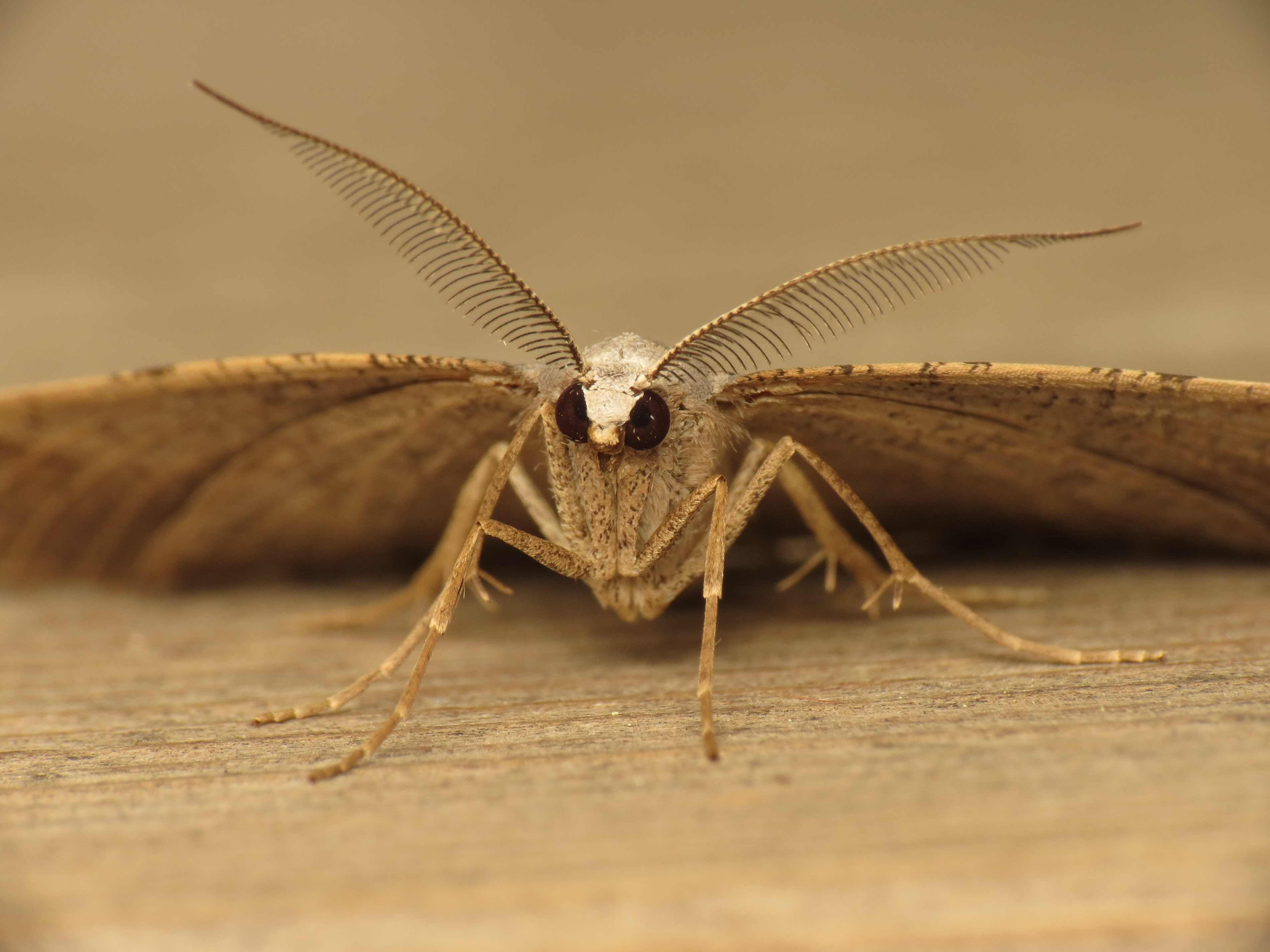 Itame vincularia (Hübner, 1813), Pont del Diable, Tarragona, Spain, 16 May 2013